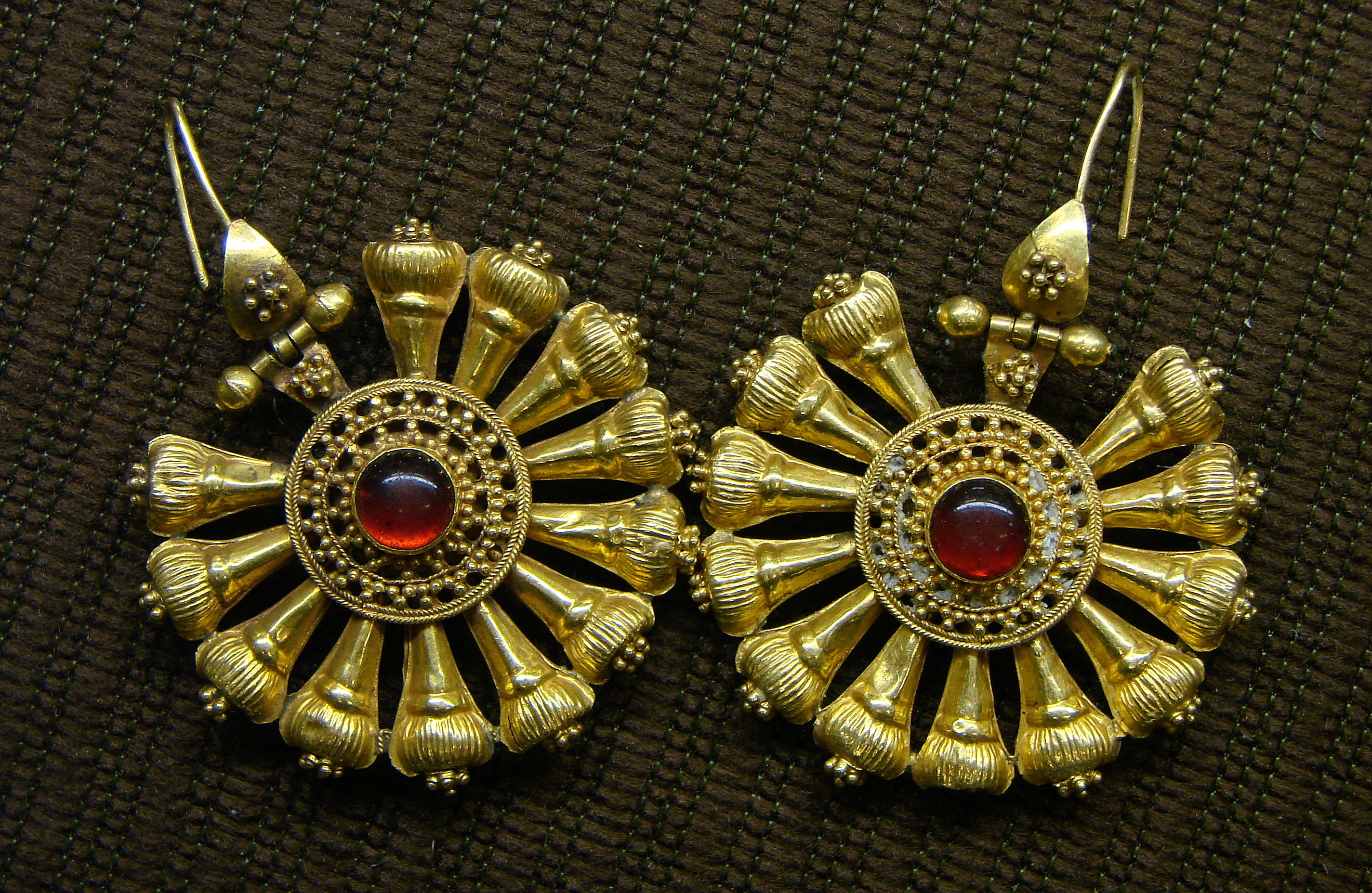 Boucles d'oreilles en or, 3ème siècle + JC. Musée de Laon.